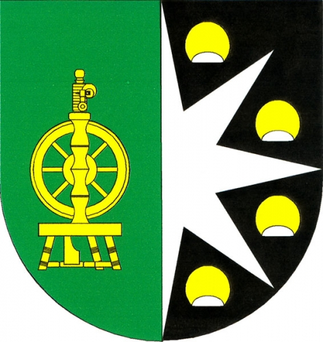 znak, Nyklovice, okres Žďár nad Sázavou